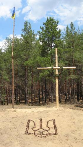 зображення меморіалу